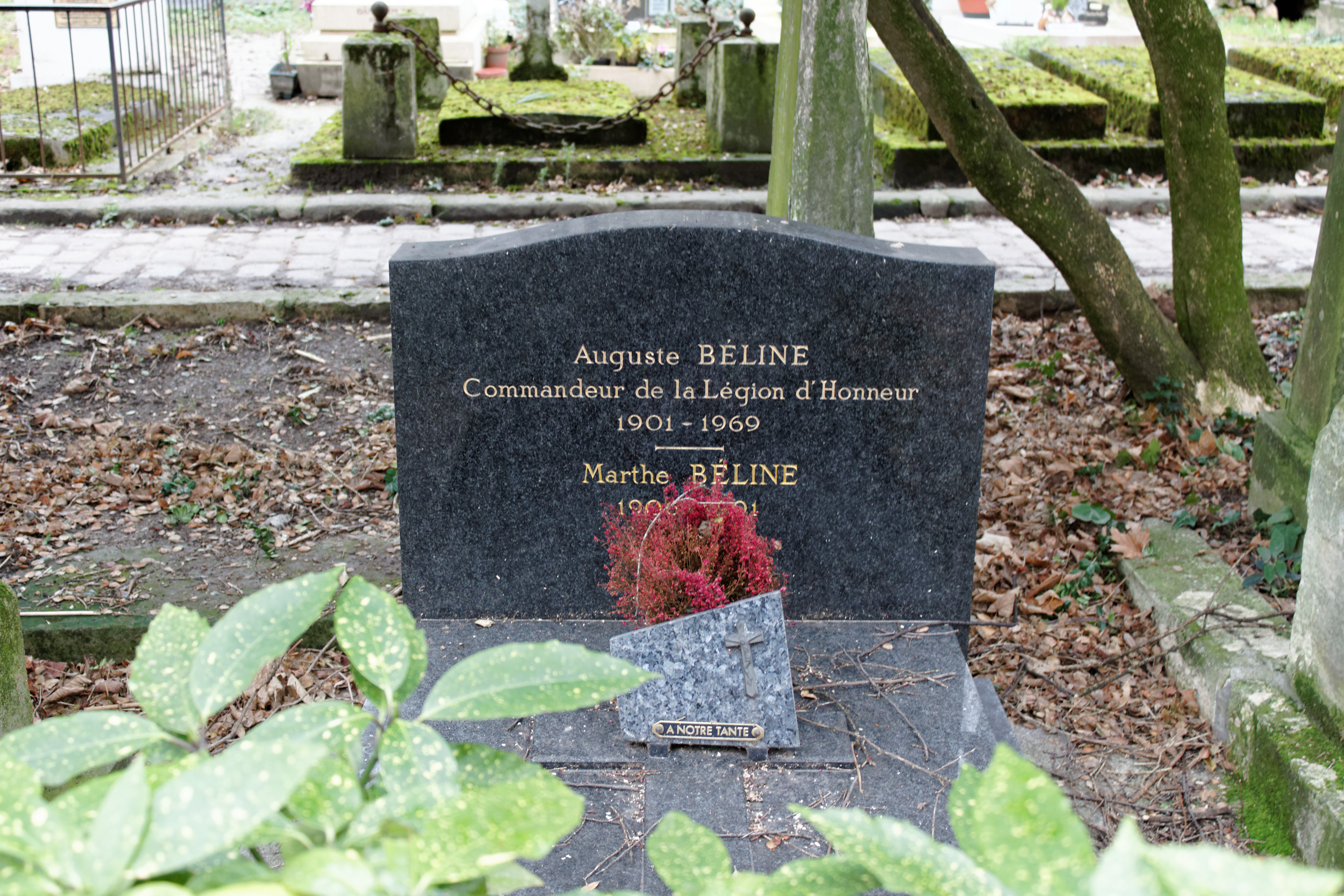 Stèle